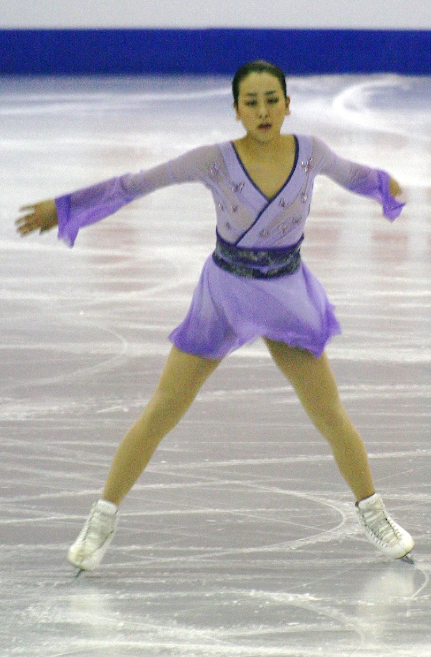 Мао Асада (Япония) на финале Гран-при по фигурному катанию 2015-2016.